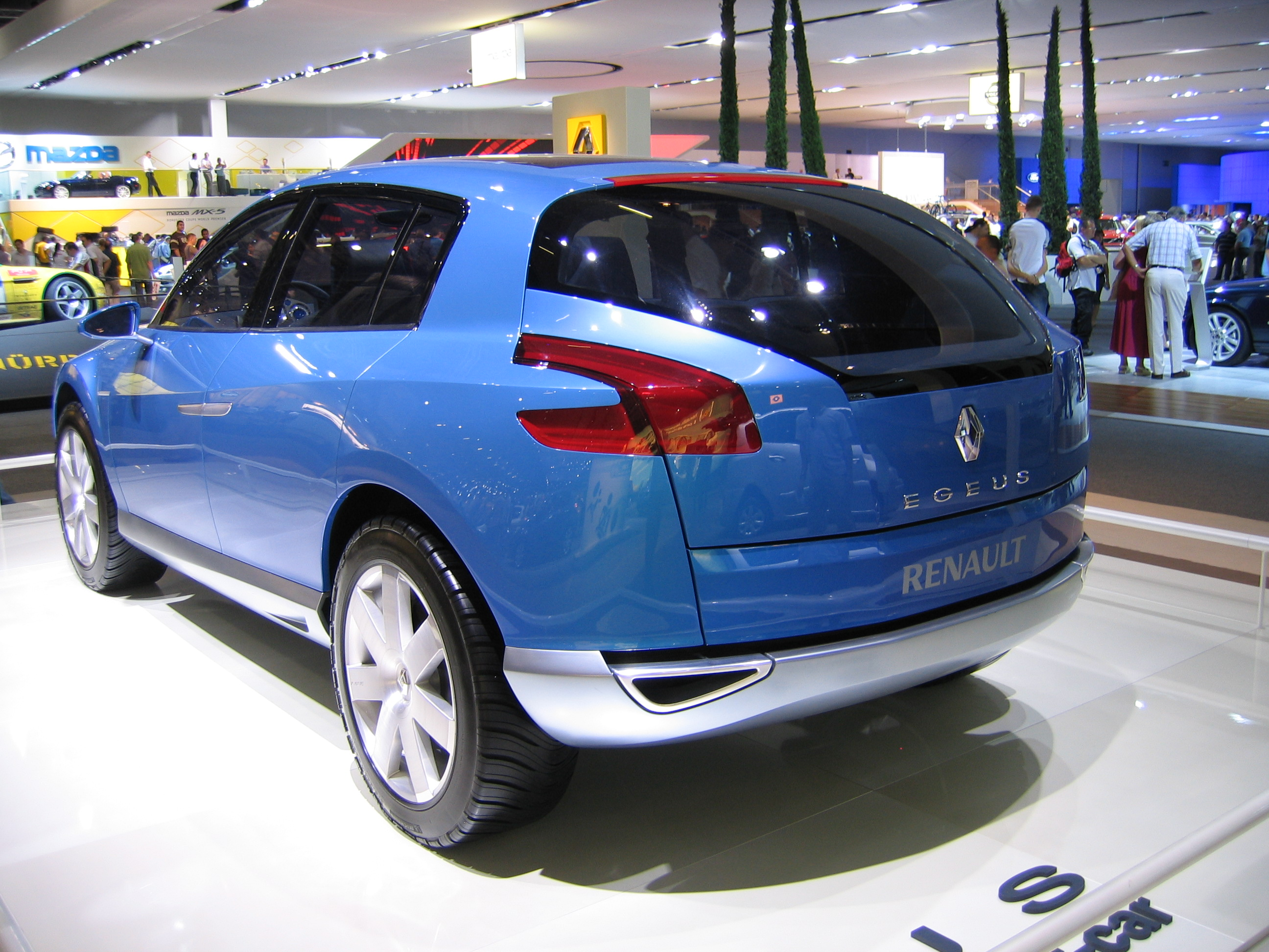 Vue de trois-quart arrière du véhicule conceptuel Renault Egeus, British International Motor Show 2006.